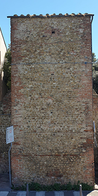 Le mura di Montelupo